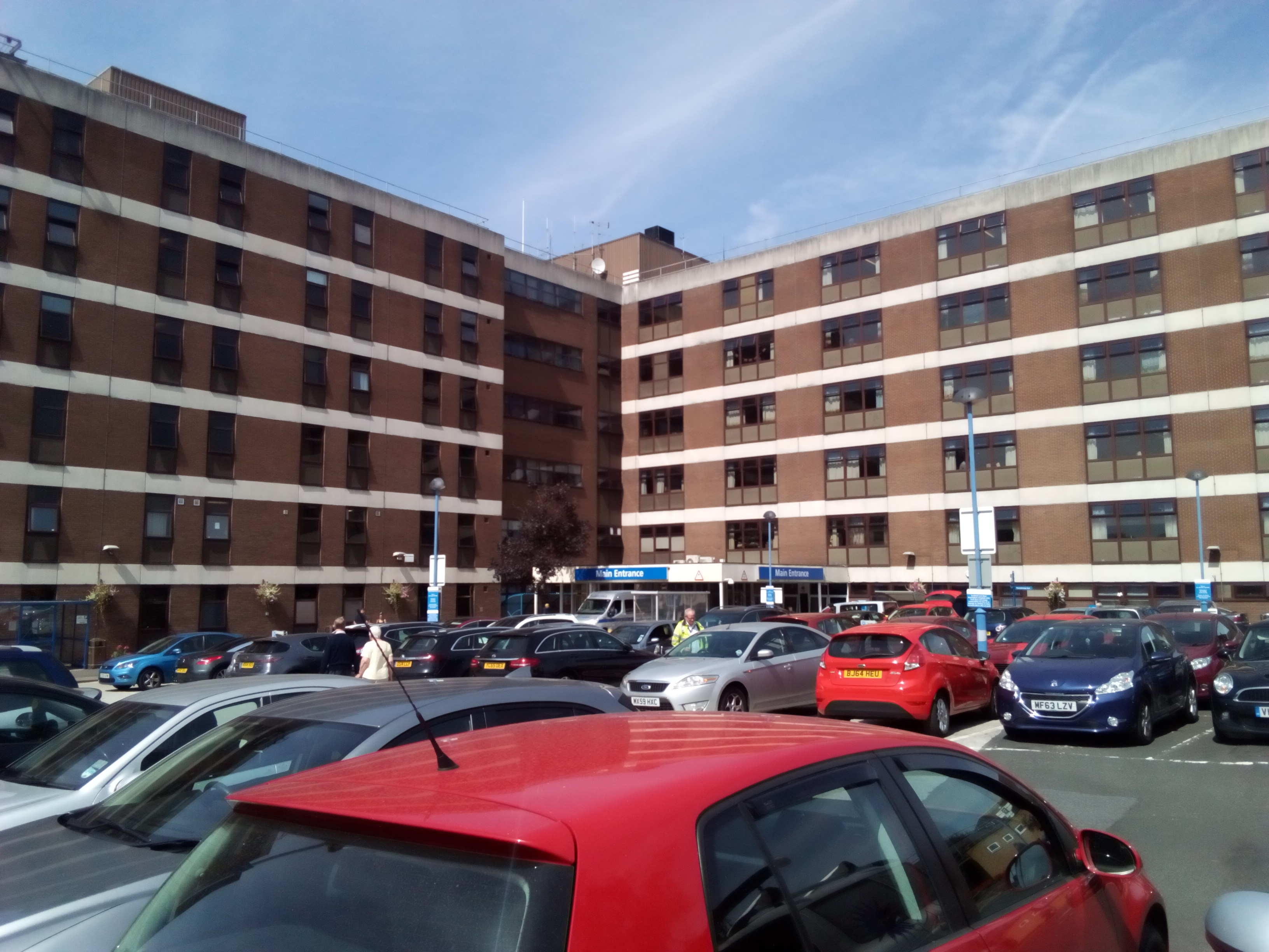 Sandwell General Hospital, West Bromwich, England